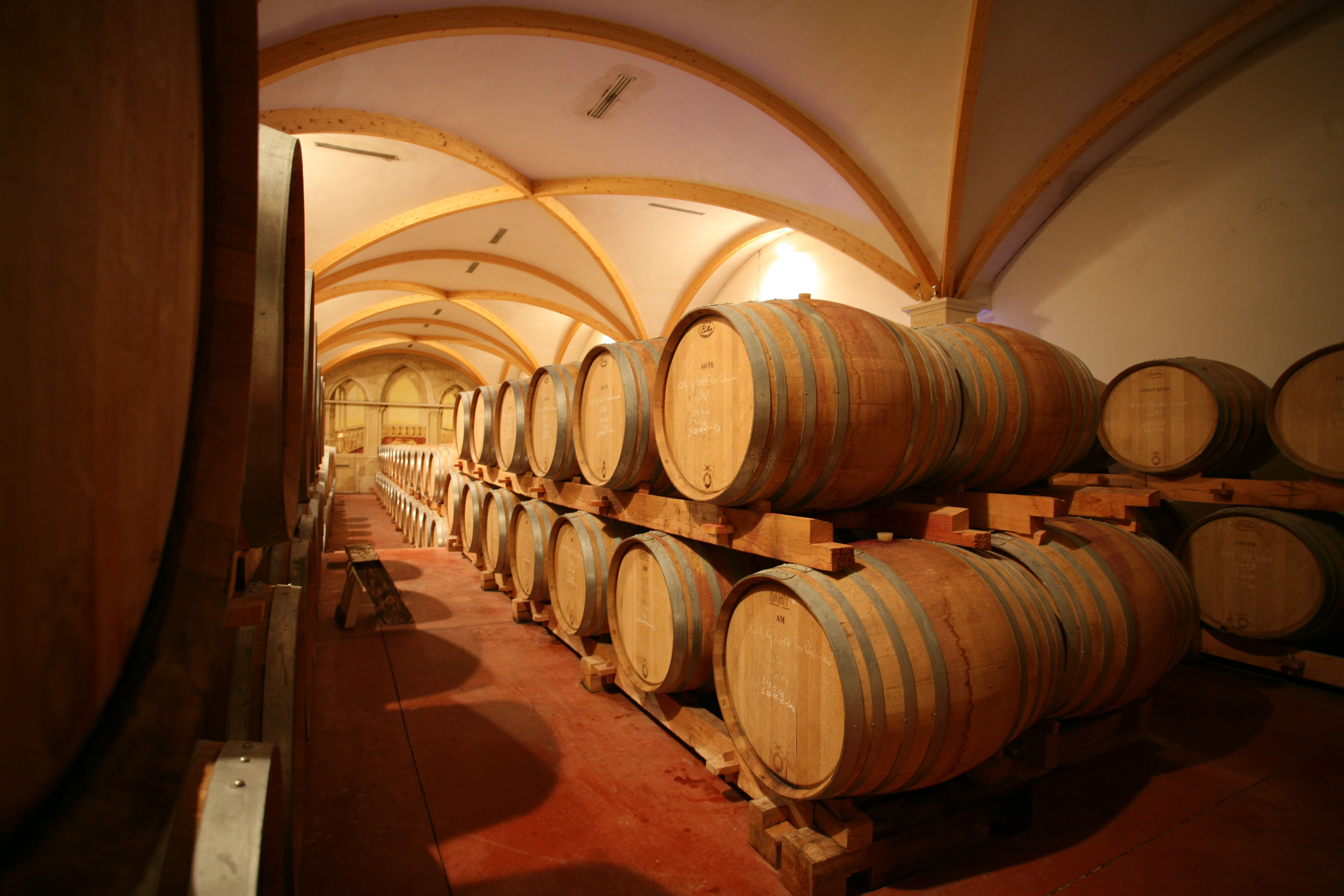 Tonneaux - cave à Beaumes-de-Venise, Vaucluse, France